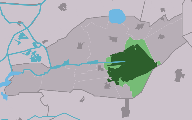 Kaartsje fan himrik fan Drachten